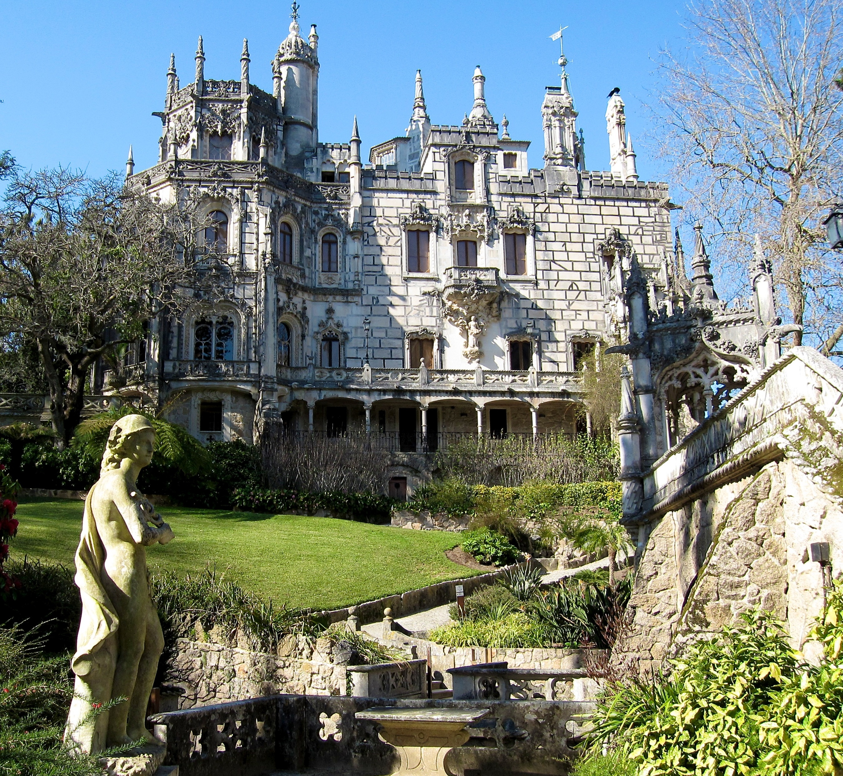 Quinta da Regaleira, Sintra. This file was uploaded for Wiki Loves Monuments in Portugal with the unique identifier 71688. This monument is classified as Imóvel de Interesse Público.